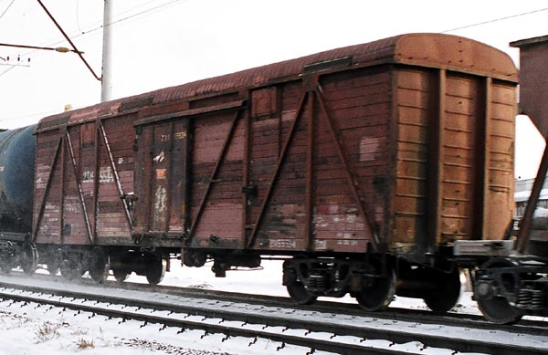 Крытый вагон Крытый вагон в составе поезда на перегоне Саратов - Трофимовский-1